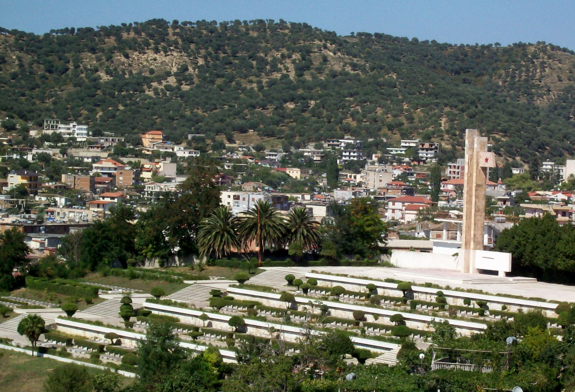 Vlora Friedhof der im 2. Weltkrieg gefallenen Partisanen